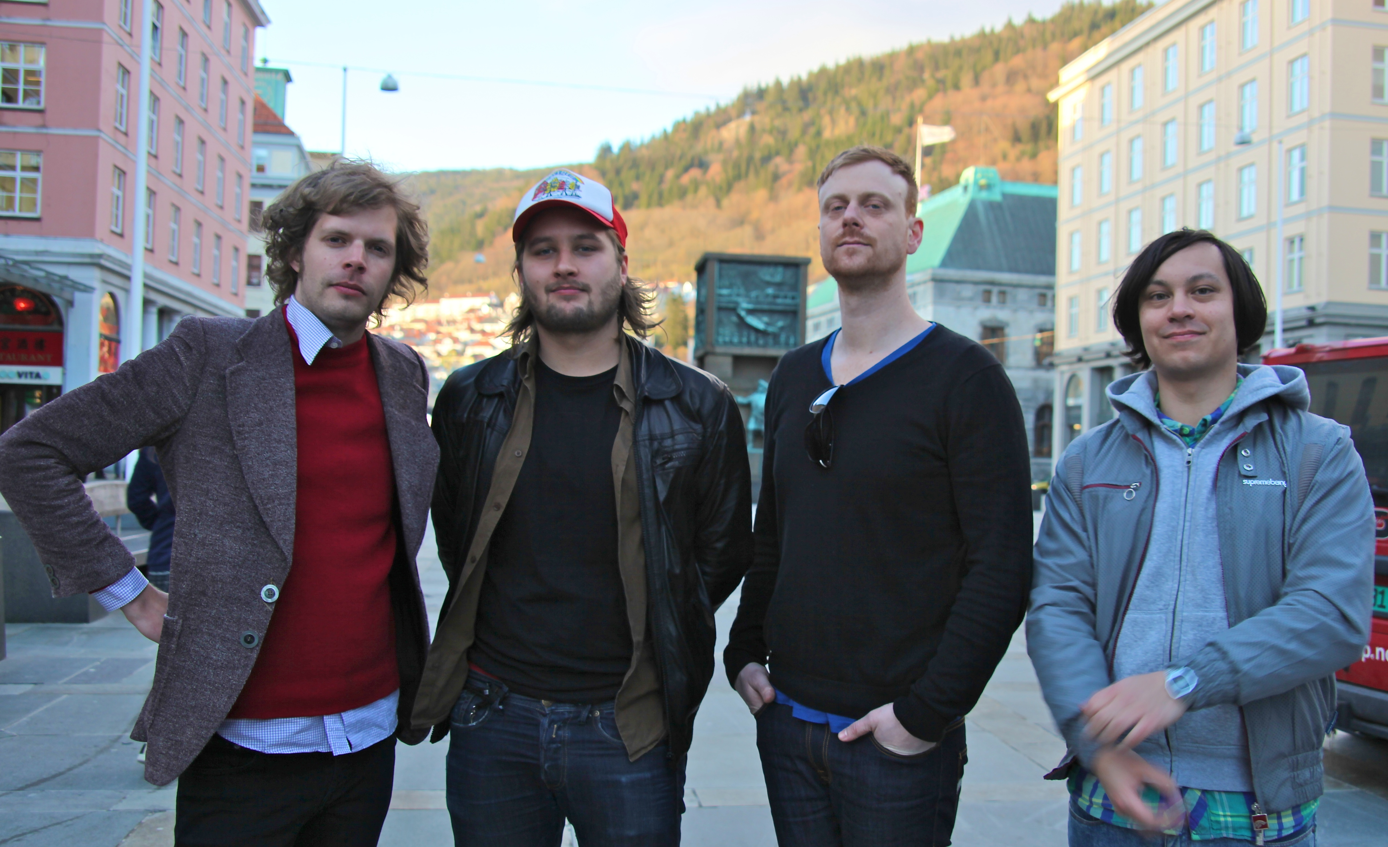 Casiokids